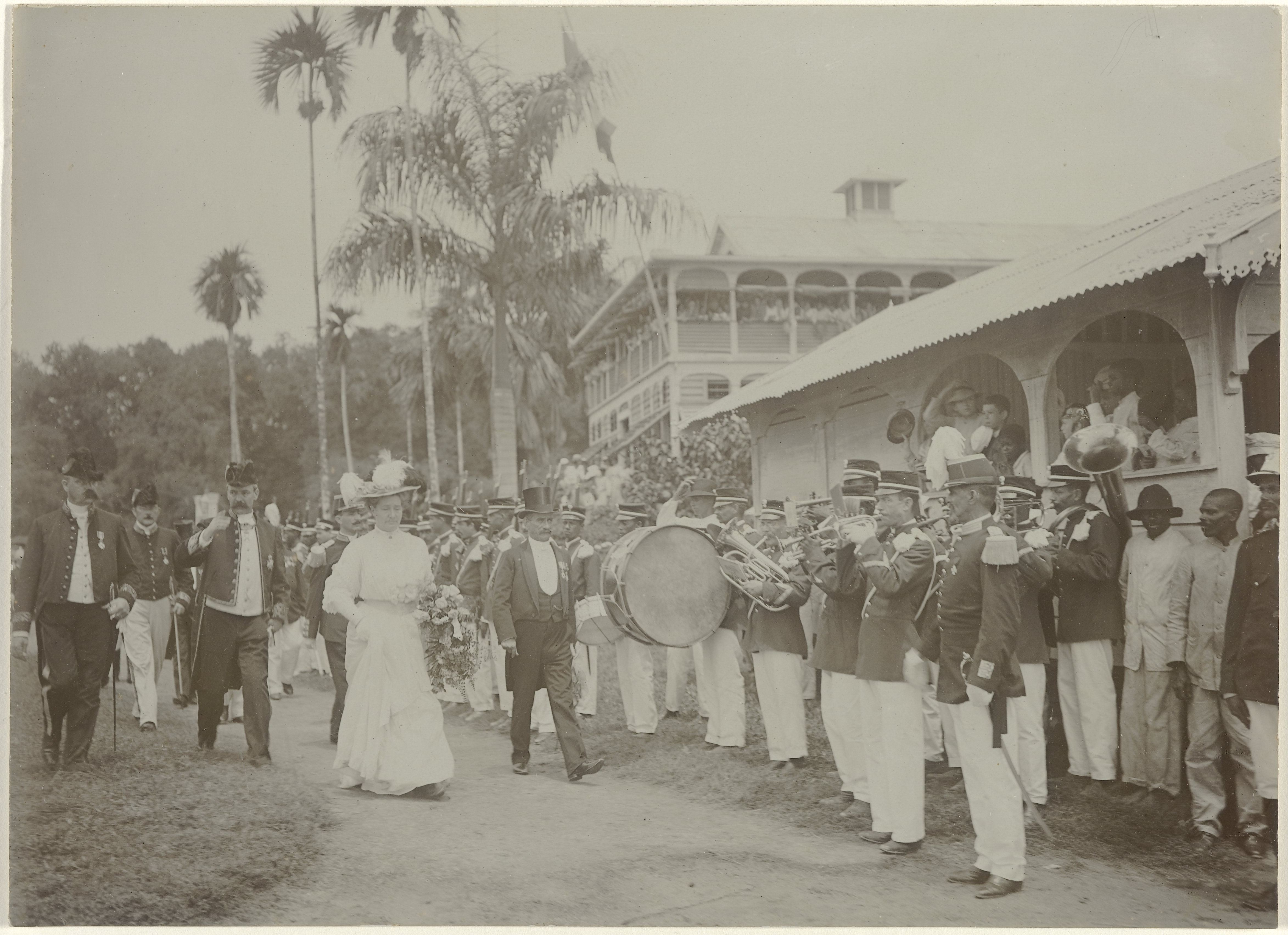 IdentificatieTitel(s): KoninginnedagObjecttype: foto Objectnummer: NG-2010-36-7Omschrijving: P. Hofstede Crull is met zijn vrouw en diverse andere hoogWaar: digheidsbekleders aangekomen bij een groot wit houten huis. Voor het huis speelt een muziekkapel. Crull is op dit moment waarnemend gouverneur van Suriname. Koninginnedag te Paramaribo.VervaardigingVervaardiger: fotograaf: anoniemPlaats vervaardiging: ParamariboDatering: 1903 - 1908Materiaal: fotopapier Techniek: fotografieAfmetingen: h 120 mm × b 170 mmOnderwerpWat: KoninginnedagWanneer: 1903 - 1908WaarParamariboWie: Petrus Hofstede CrullVerwerving en rechtenVerwerving: aankoop 27-jan-2010Copyright: Publiek domein